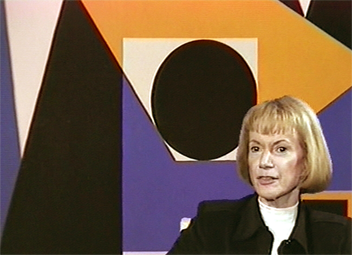 Portrait de Geneviève Claisse